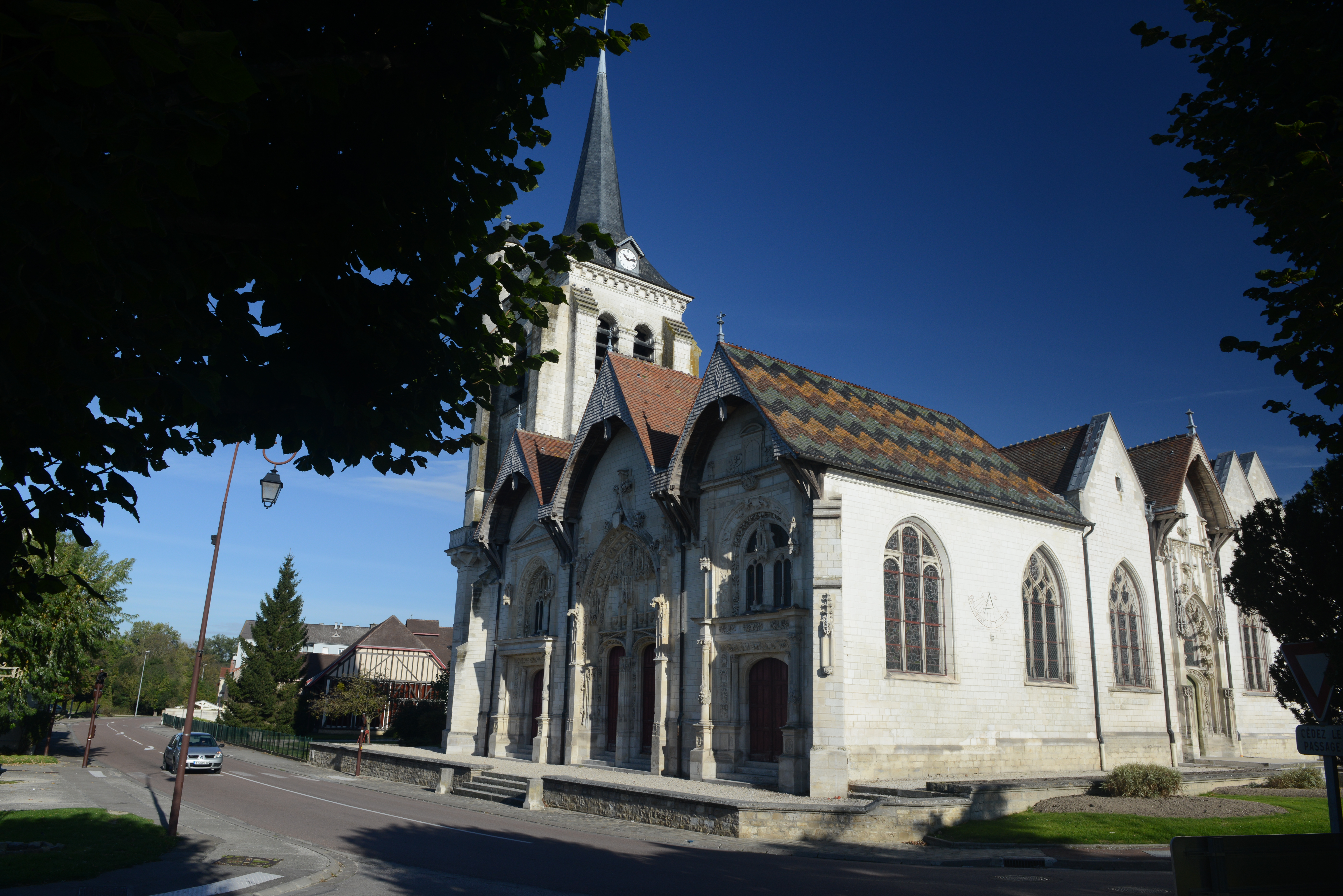 EGLISE NOTRE DAME DE L ASSOMPTION PSM.